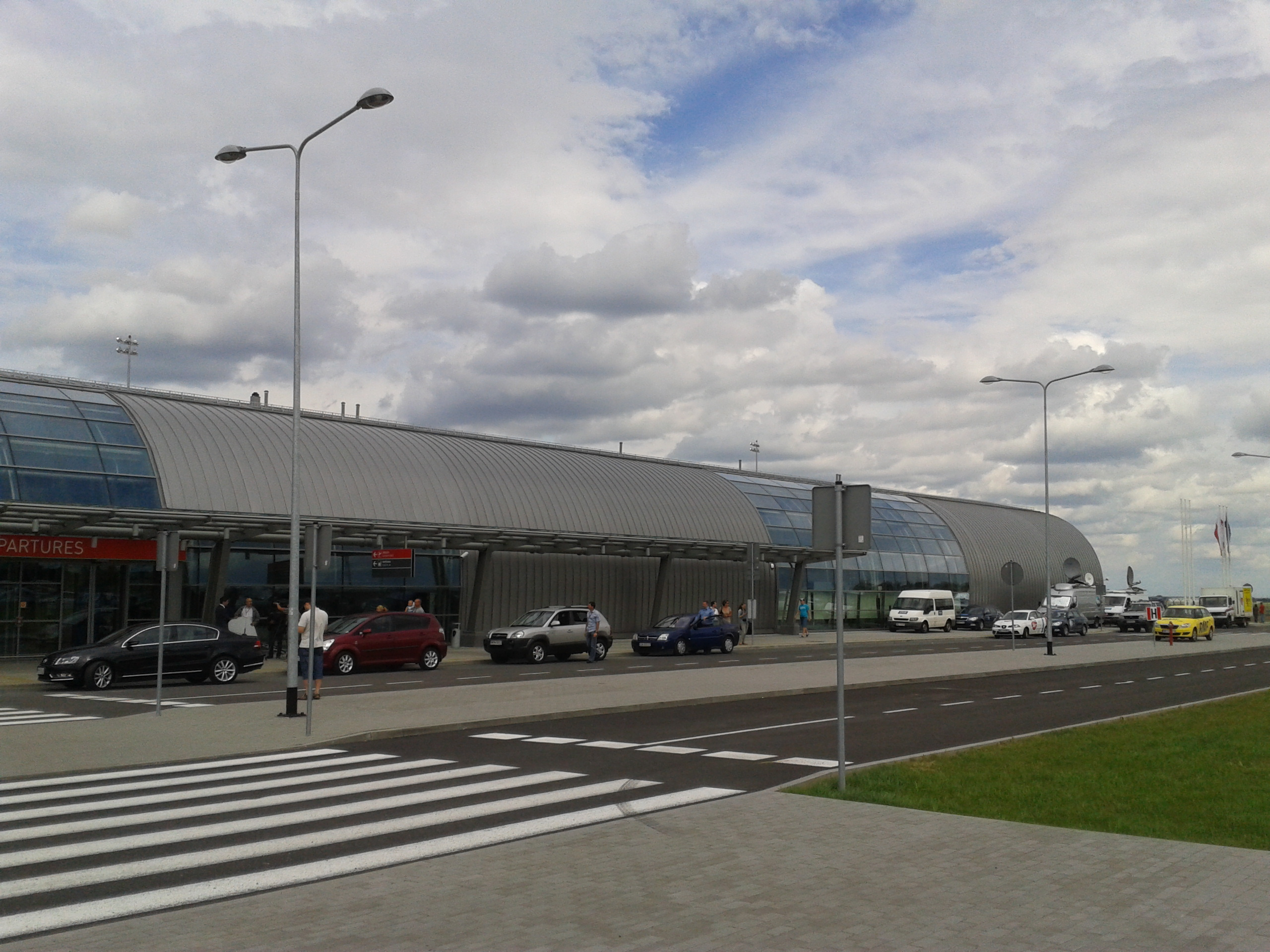 Port lotniczy Modlin w dniu przylotu pierwszego samolotu rejsowego (17.00 z Budapesztu) w czasie imprezy dla ifcjeli w terminalu. Pod terminalem widać przedstawicieli mass-mediów